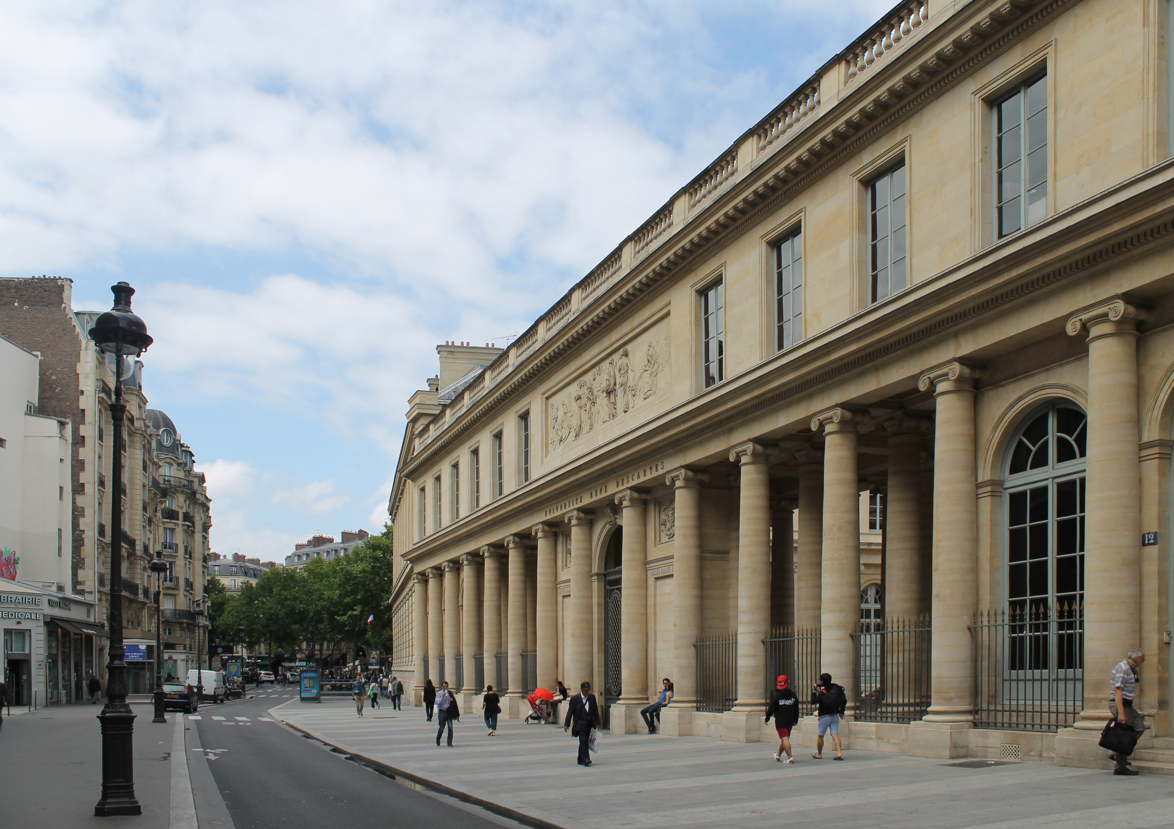 Paris Descartes University, Rue de l'École de Médecine, Paris, France.